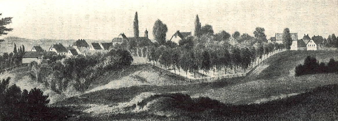 Nach einer Lithografie von Sitzmann, Lehrer an der Knabenanstalt In der Mitte der Gottesacker in seiner Ausdehnung von 1835-1883. Dahinter das frühere Diasporahaus. Links daneben der Dachreiter des Kirchensaals, davor das Schwesternhaus. Der hohe Giebel links neben der Pappel ist dessen sogenannter „Chorsaalflügel“. Letztes Haus links auf dem Bilde das Wohnhaus der Familie Schneider am Schneiderberg. In der Mitte zwischen diesem Hause und der Pappel das hohe Brüderhaus. Ganz rechts auf dem Bilde das neue Diasporahaus. Links neben diesem hinter der Pappel das Hinterhaus der früheren Glockengießerei. Zwischen beiden Häusern die Glockengasse.